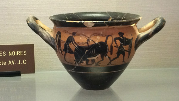 Corsu: Skyphos à fiura nera di u museu d'Aleria. Rapresenta à Herakles cù u toru di Creta